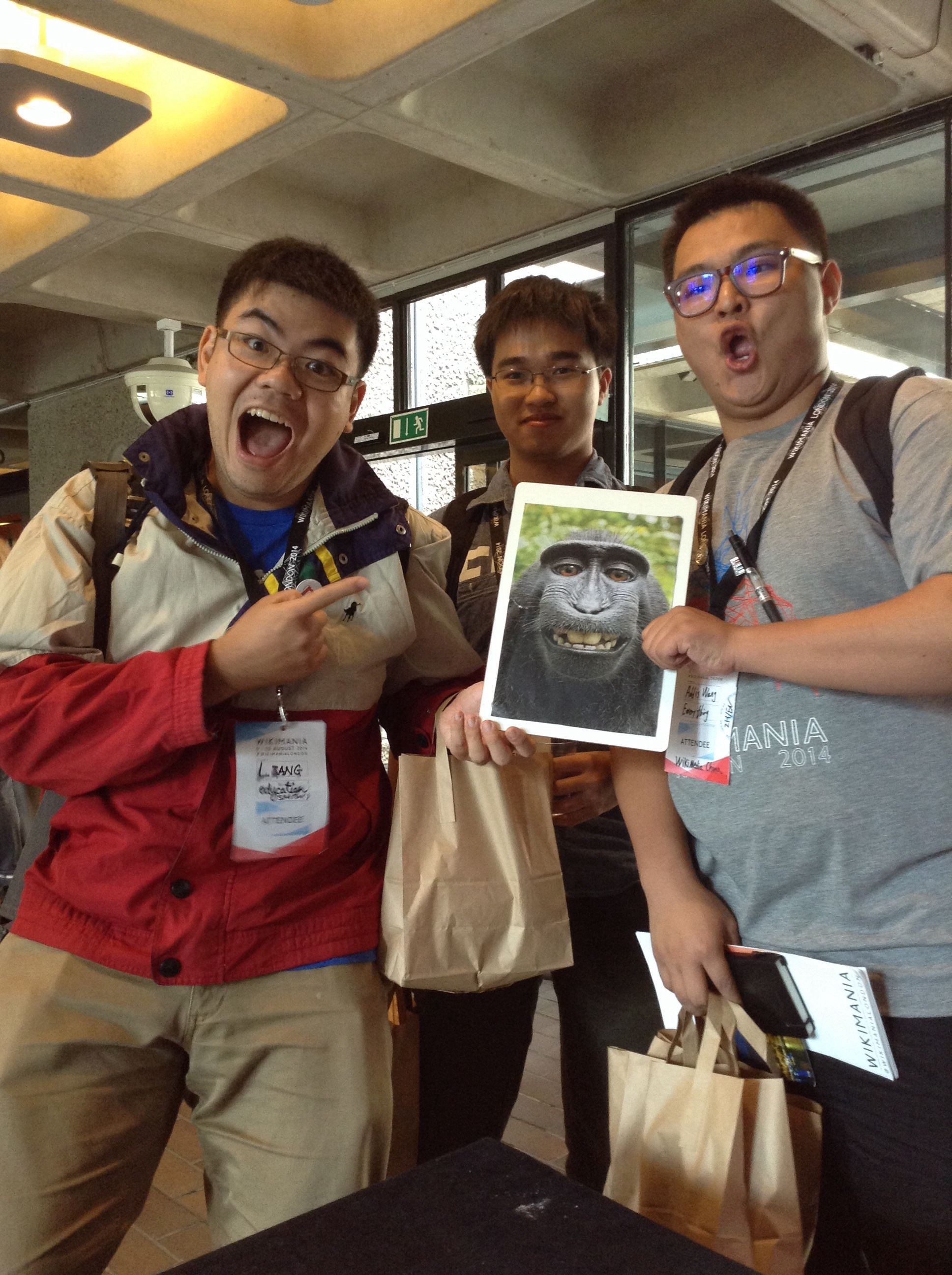 image Wikimania London 2014